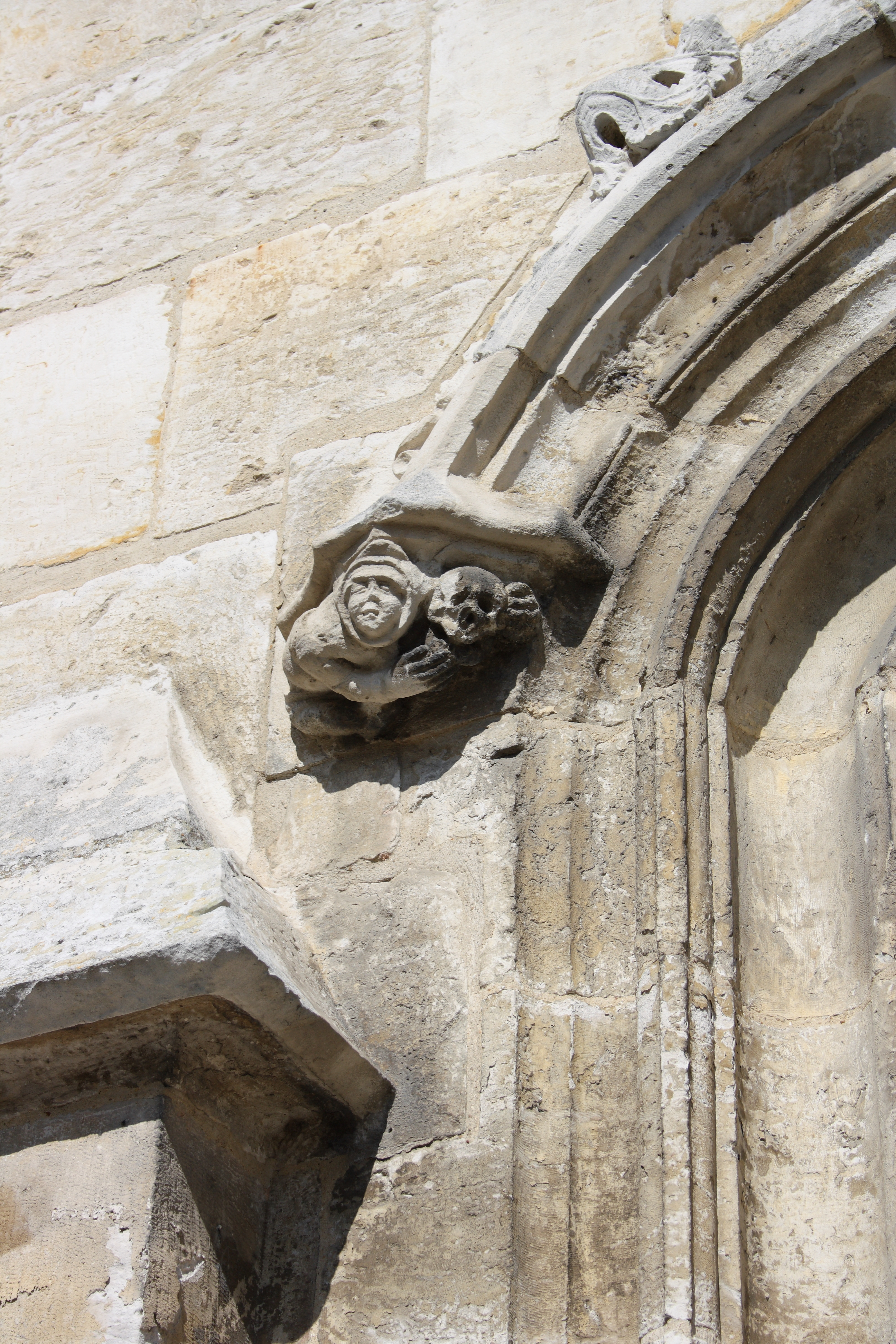 Kirche Saint-Samson in La Roche-Guyon